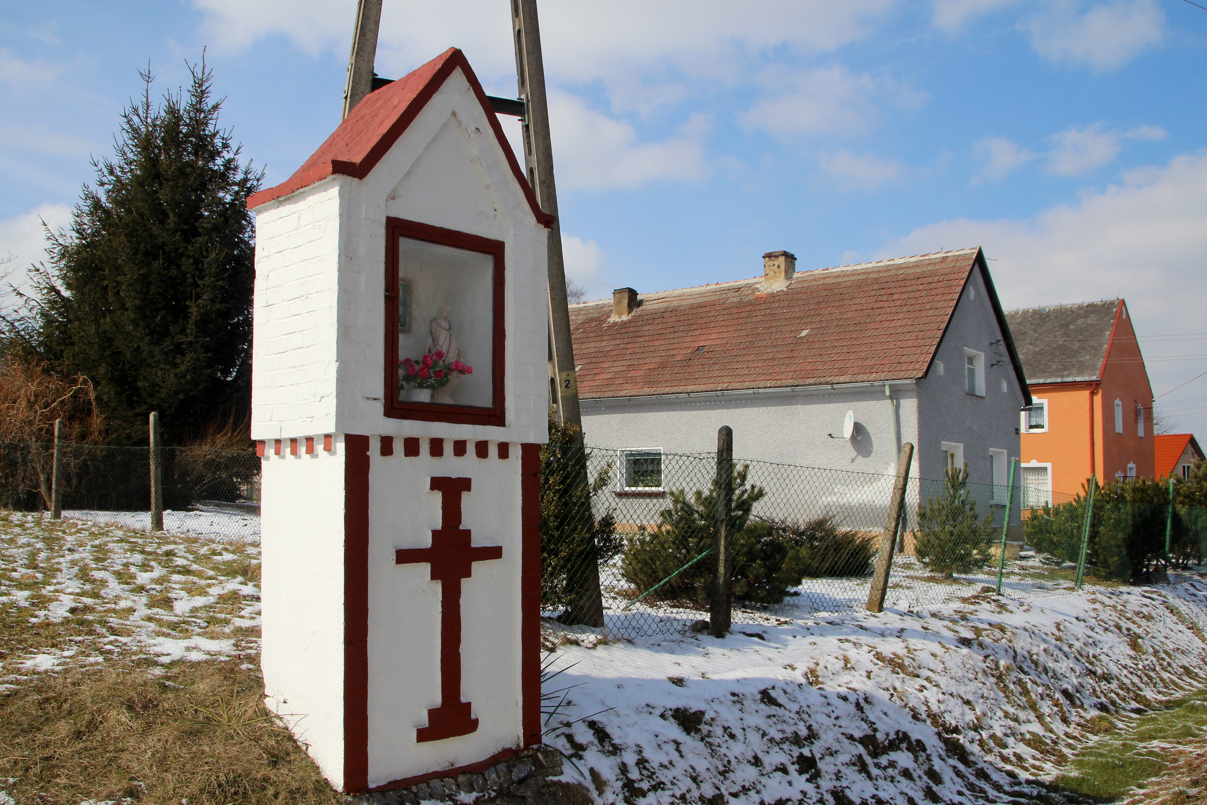 Kapliczka w Wilamowicach Nyskic – wieś w Polsce, w województwie opolskim, w powiecie nyskim, w gminie Głuchołazy.